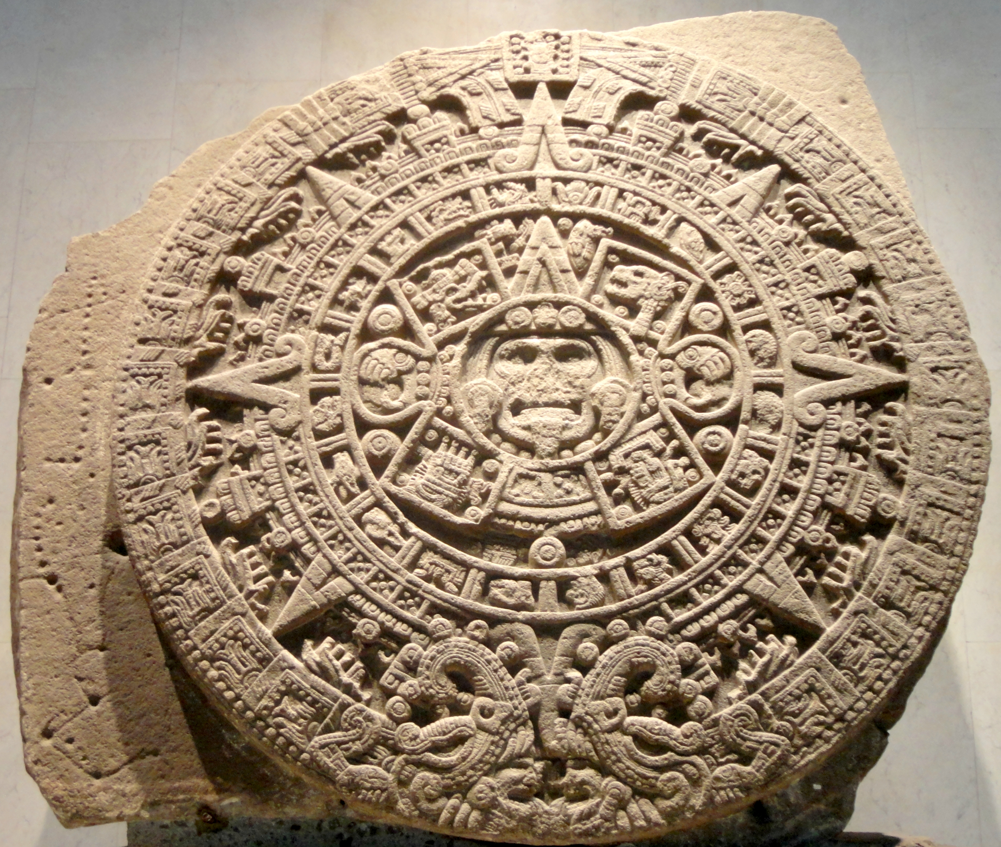 Piedra del Sol, exhibida en el Museo Nacional de Antropología, Ciudad de México.